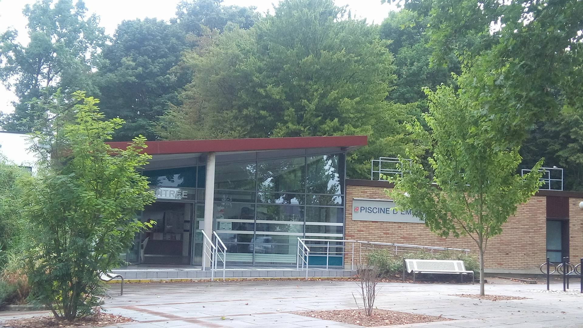 Piscine d'Emerainville